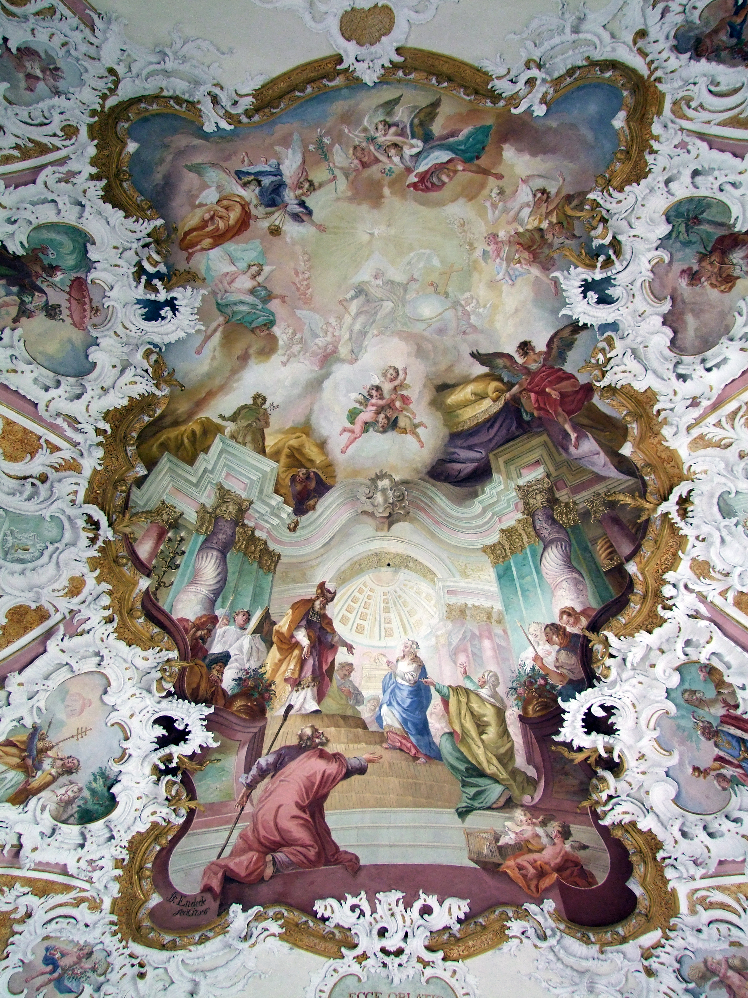 Chorhauptfresko an der Decke des Chors der Wallfahrtskirche "Unserer lieben Frau vom Berge Karmel" Maler war Johann Baptist Enderle, welcher die Kirche von 1766 ausmalte.